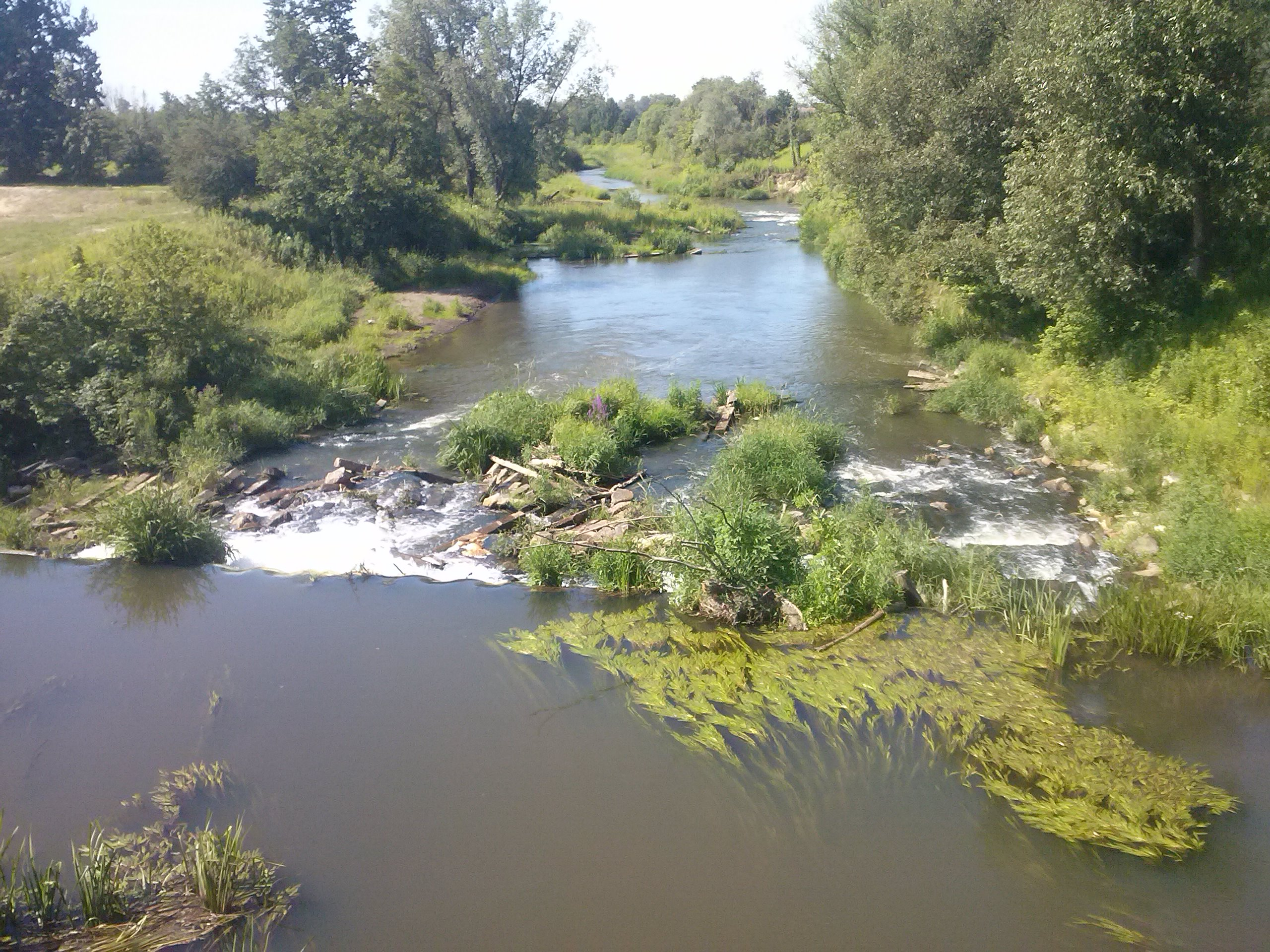 Wodospad na Lubaczówce przy moście na "DW 870" (Jarosław - Sieniawa) w Manasterzu